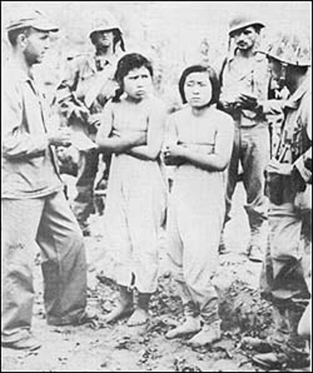 미군에 생포된 인민군 간호원 2명. 당시 체포된 북한 인민군 여성의 일부는 강간당하거나 강제로 '위안부'가 되었다.